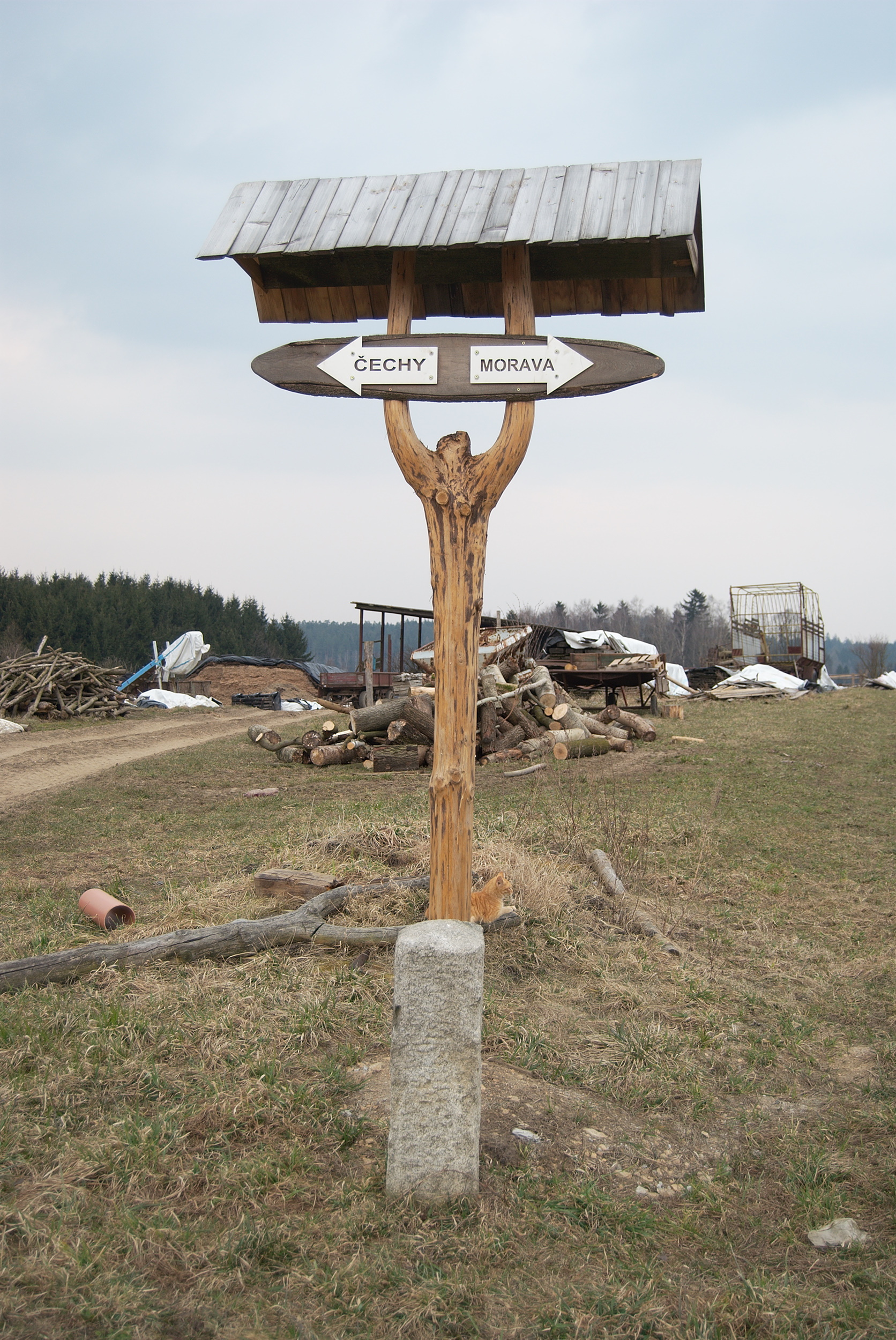 Označení zemské hranice Čech a Moravy na hranici mezi katastrálním územími Sázava (téměř zcela Čechy) a Česká Mez (Morava). Označení hranice provedl majitel přilehlého českého statku pan Jaroslav Janáček